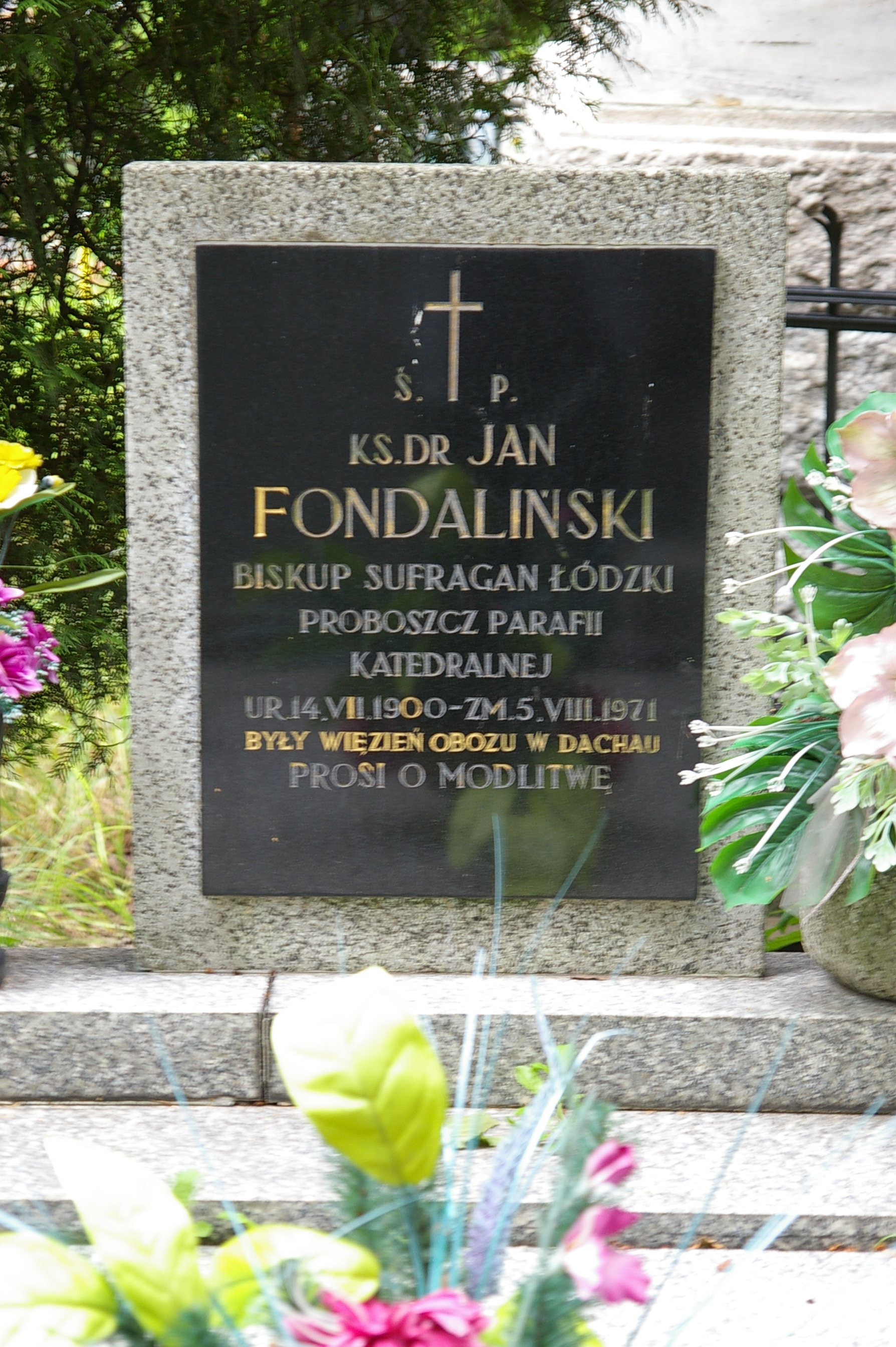 Grób Jana Fondalińskiego naStarym Cmentarzu w Łodzi